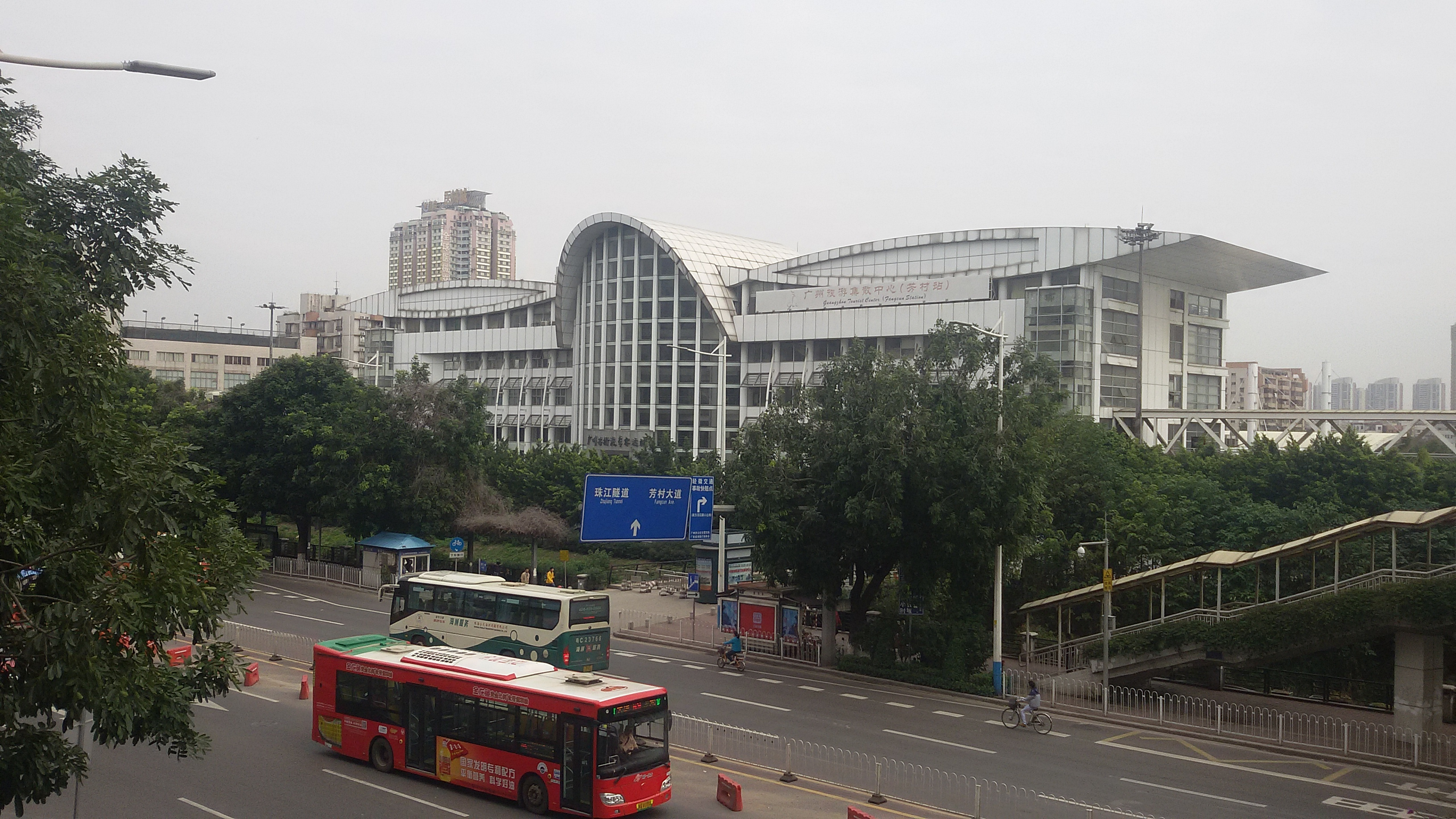 粵語: 芳村汽车客运站